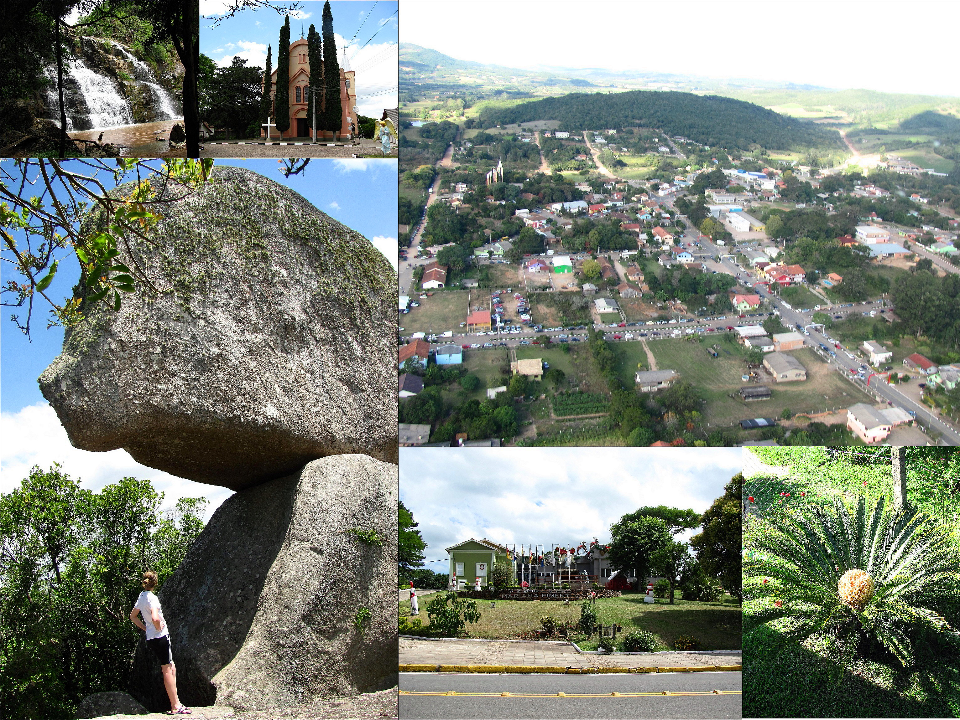 Montagem com Cascata do Português, Igreja Matriz, Foto aérea do centro da cidade, Pedra Equilibrada, Prefeitura e Brasão da cidade. Todas as fotos, exceto o brasão, são de minha autoria.